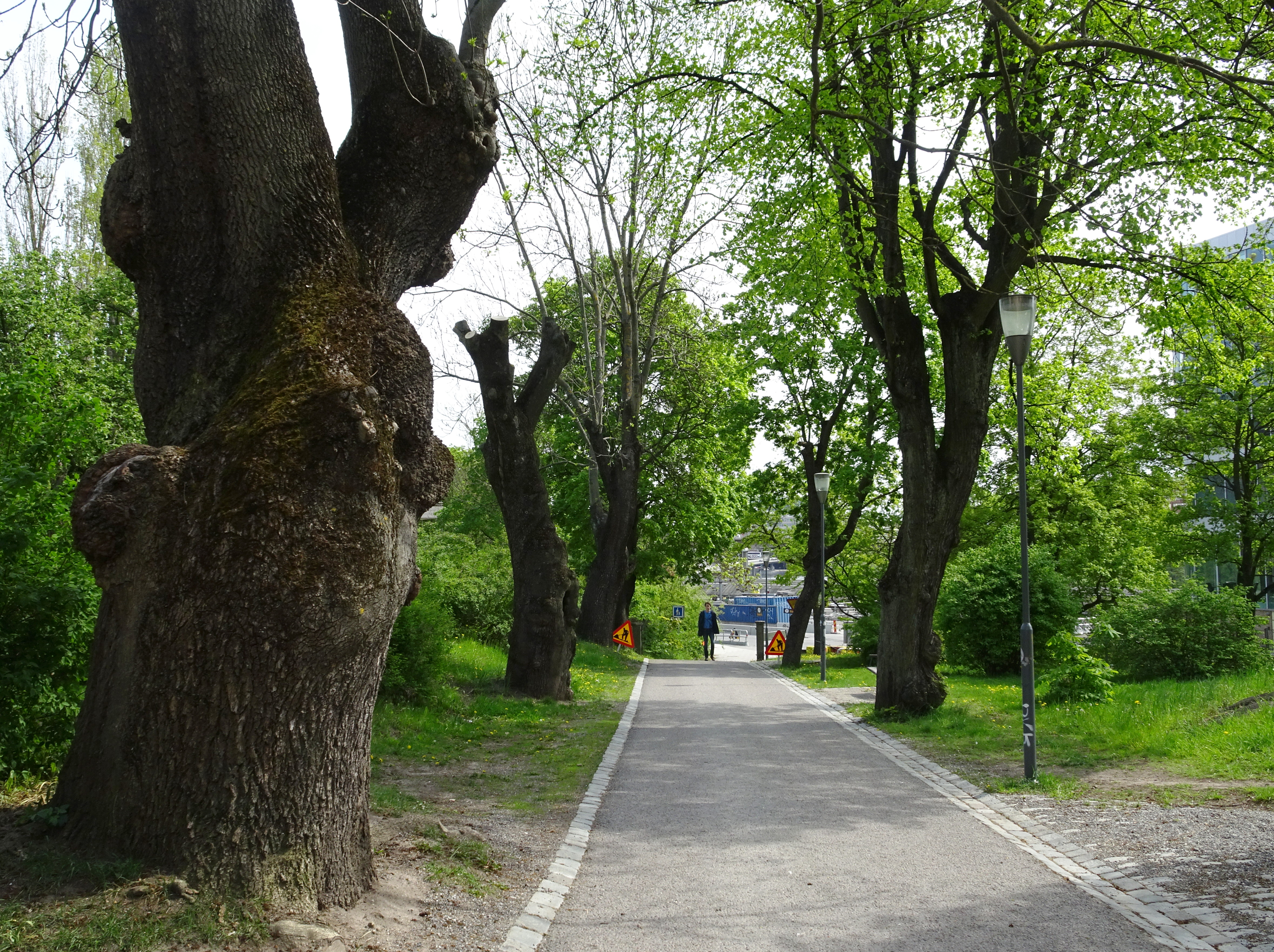 Sabbatsbergsvägen är den gamla allén till Sabbaths malmgård